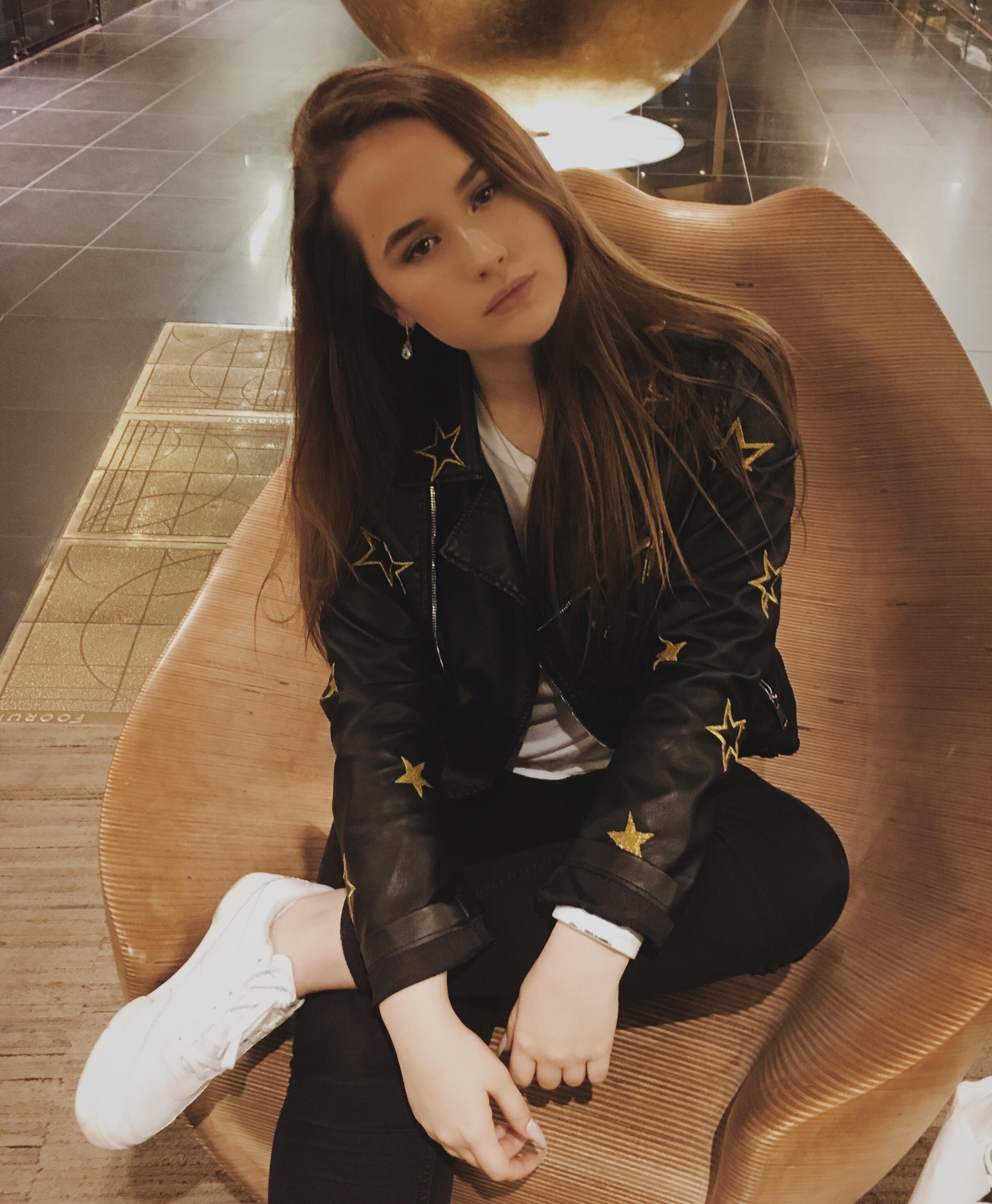 Emily J